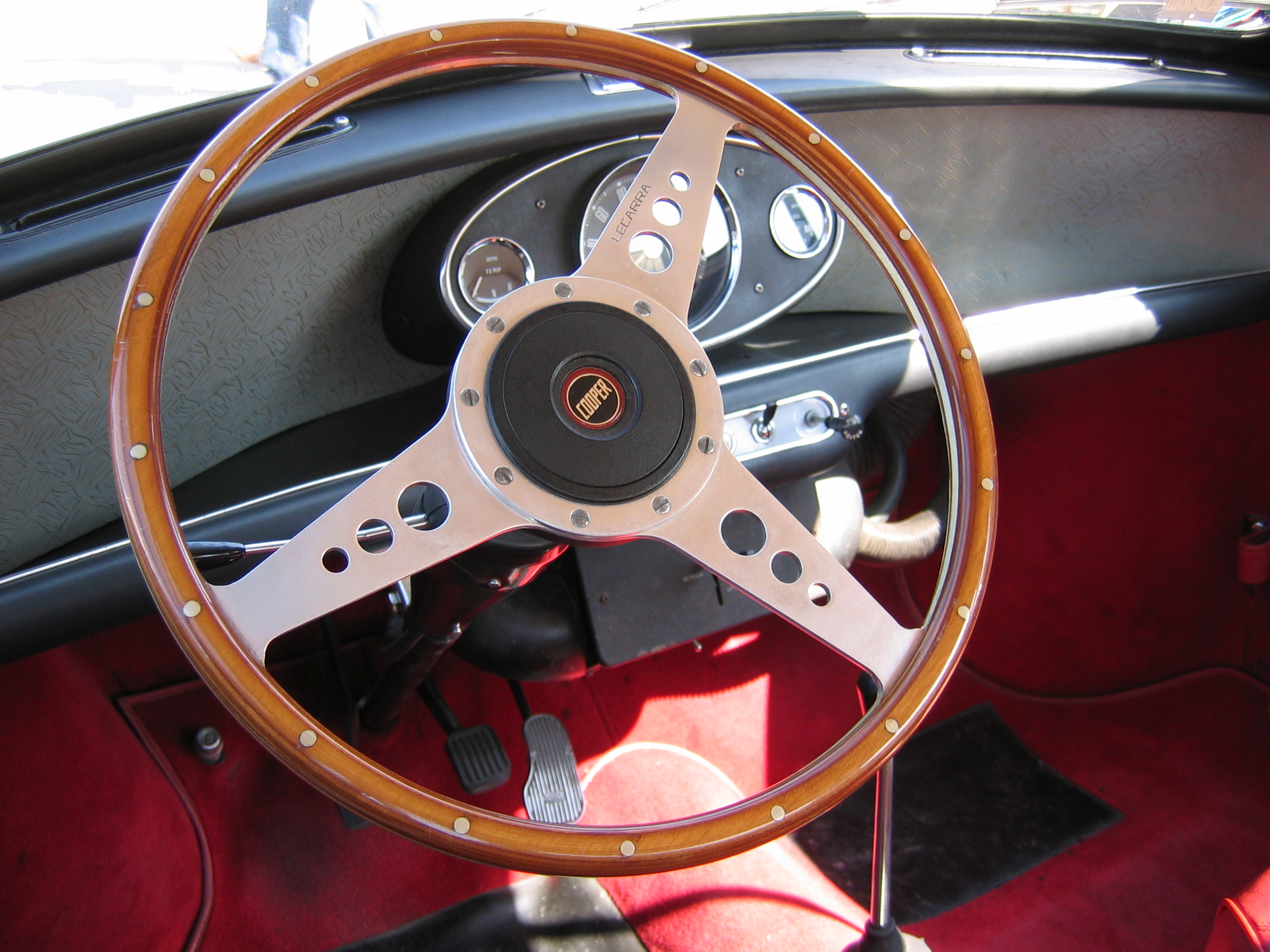 Intérieur d'origine d'une mini morris cooper des années 60